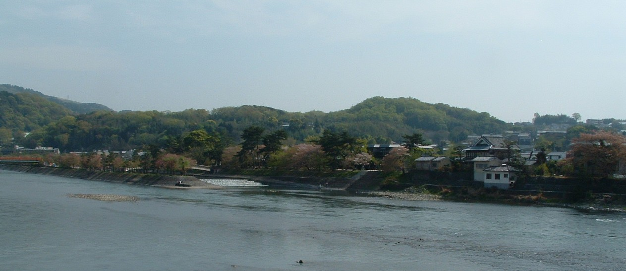 宇治川。宇治市内にて。